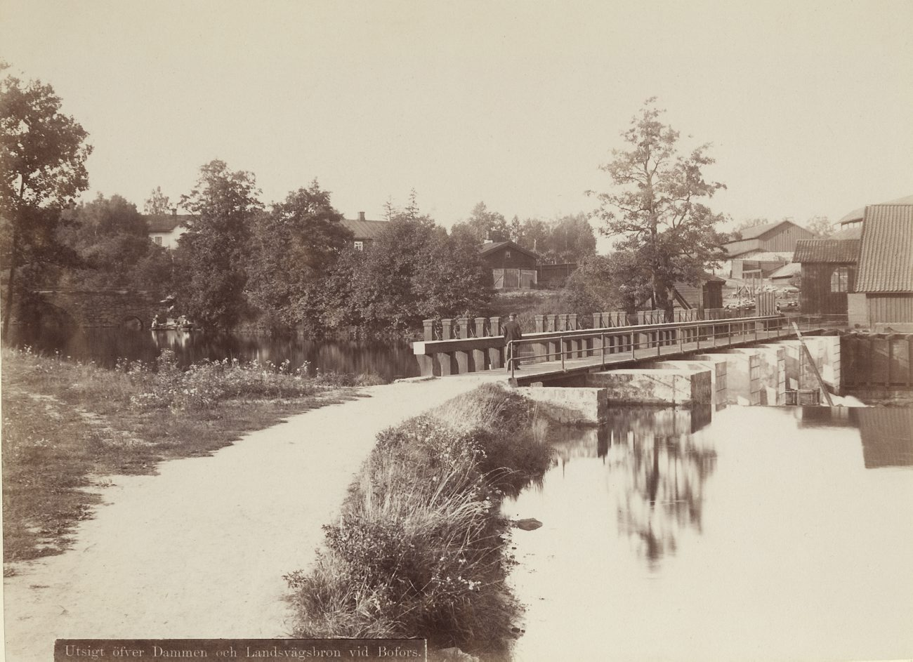 DIG4731. Bofors Kraftstation. Utsikt över dammen och landsvägsbron vid Bofors. Fotografiet är skänkt till Tekniska museet från Svenska Turistföreningen.